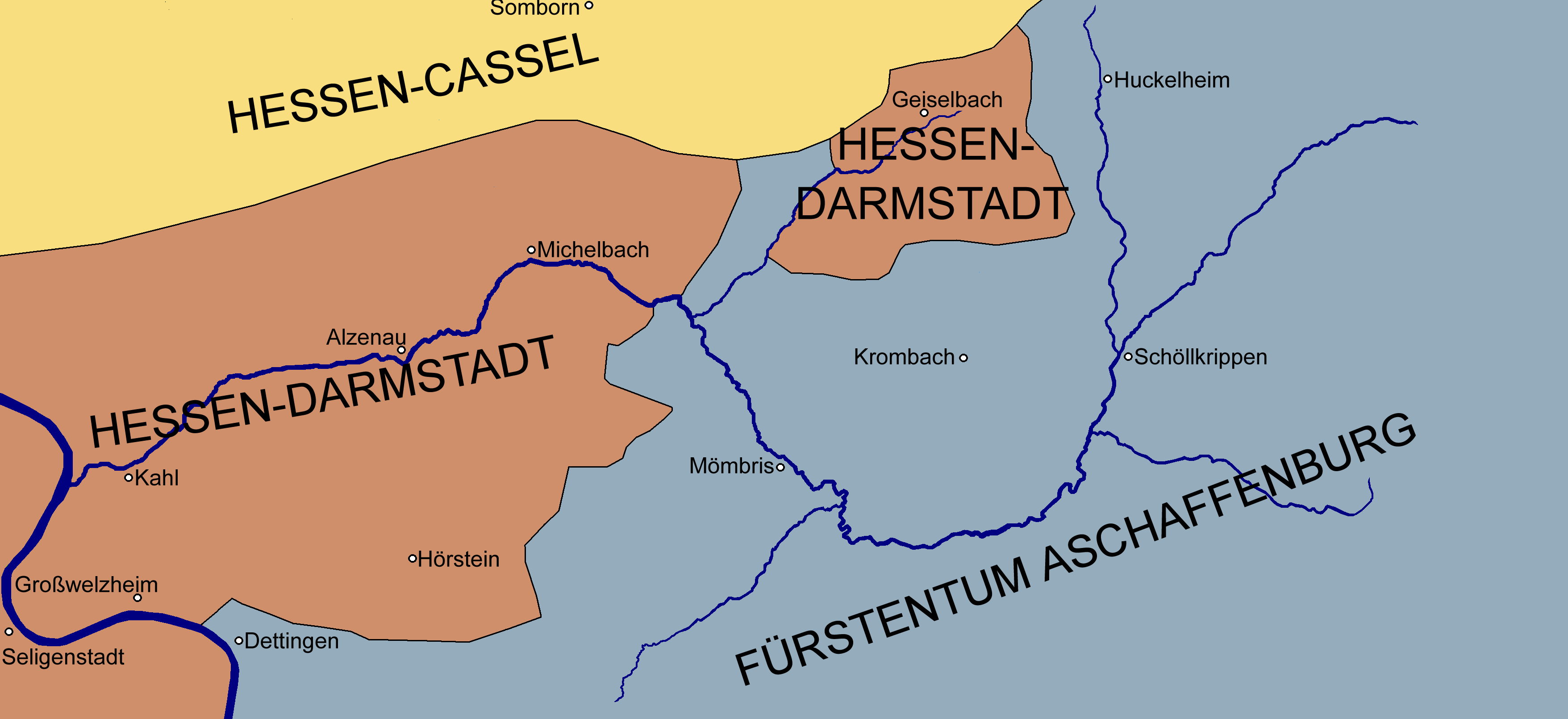 Die politische Zugehörigkeit des Kahlgrundes um 1805. Der Grenzverlauf der historischen Territorien kann stark abweichend dargestellt sein. Die Zugehörigkeit einiger Dörfer konnte nicht exakt nachgewiesen werden. Die Ortsnamen wurden in ihrer heutigen Namensform eingetragen.